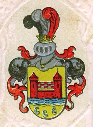 Schwelmer Stadtwappen (Ausschnitt einer Ansichtskarte)